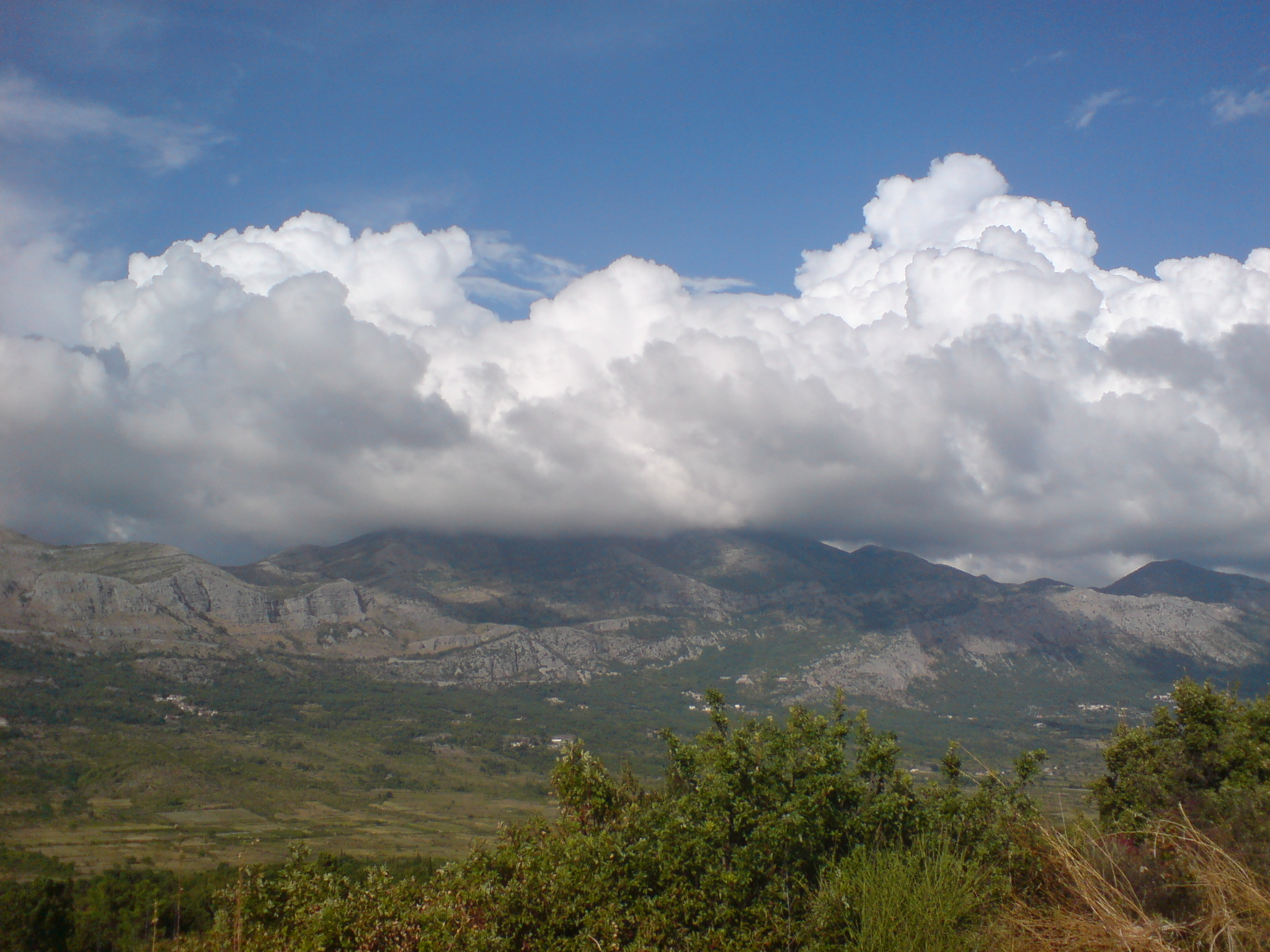 Snježnica mountain in Konavle near Dubrovnik, Croatia